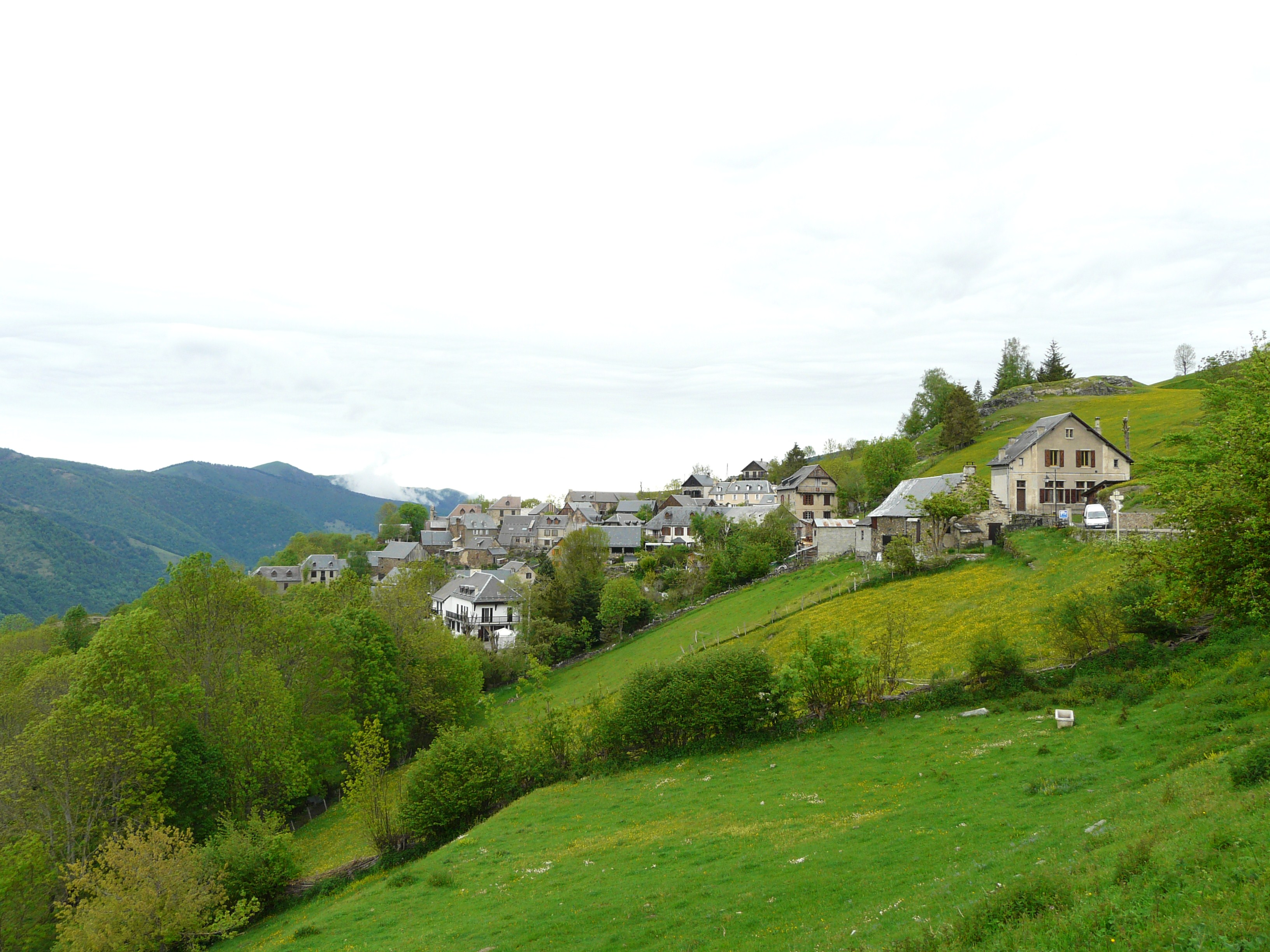 Le village d'Artigue à flanc de montagne, Haute-Garonne, France